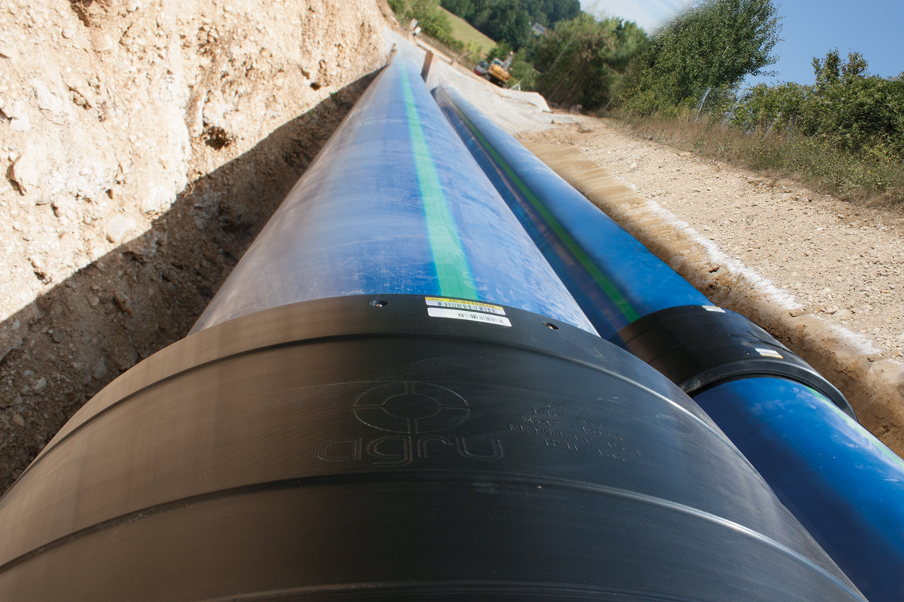 AGRU Sureline Rohr